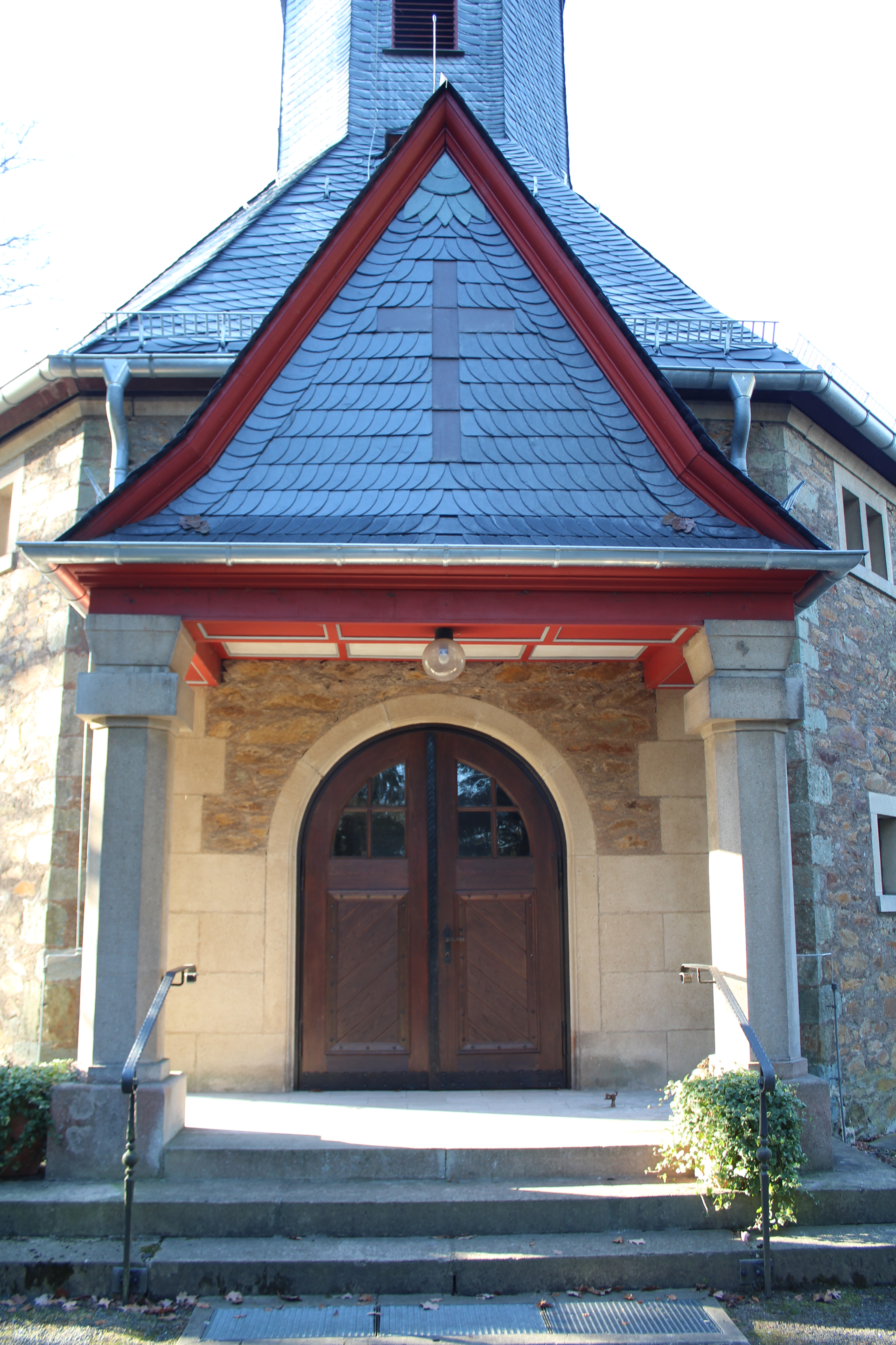 Evangelische Kirche Albshausen (Solms), Lahn-Dill-Kreis, Hessen, Deutschland